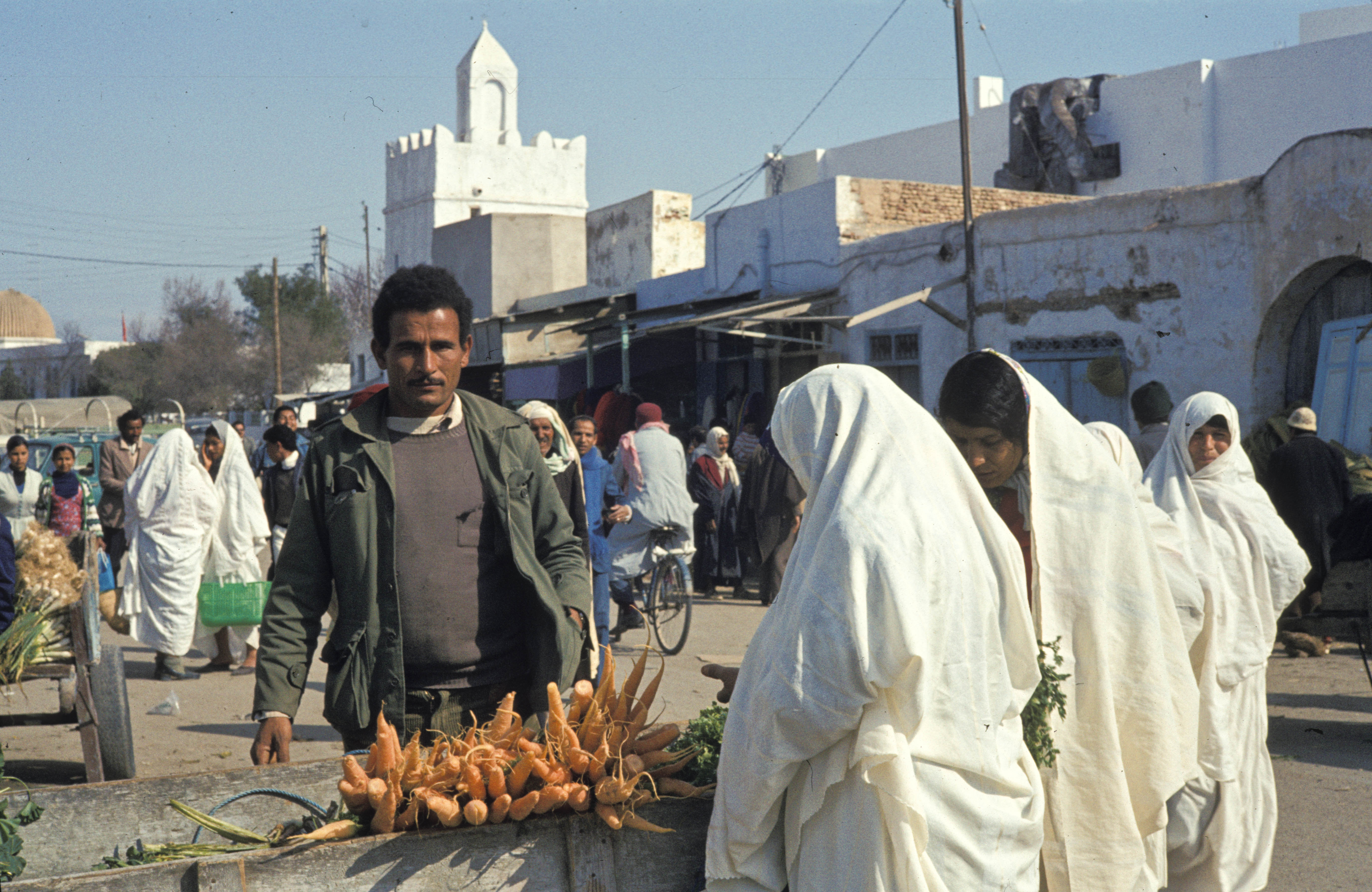 Tunisia